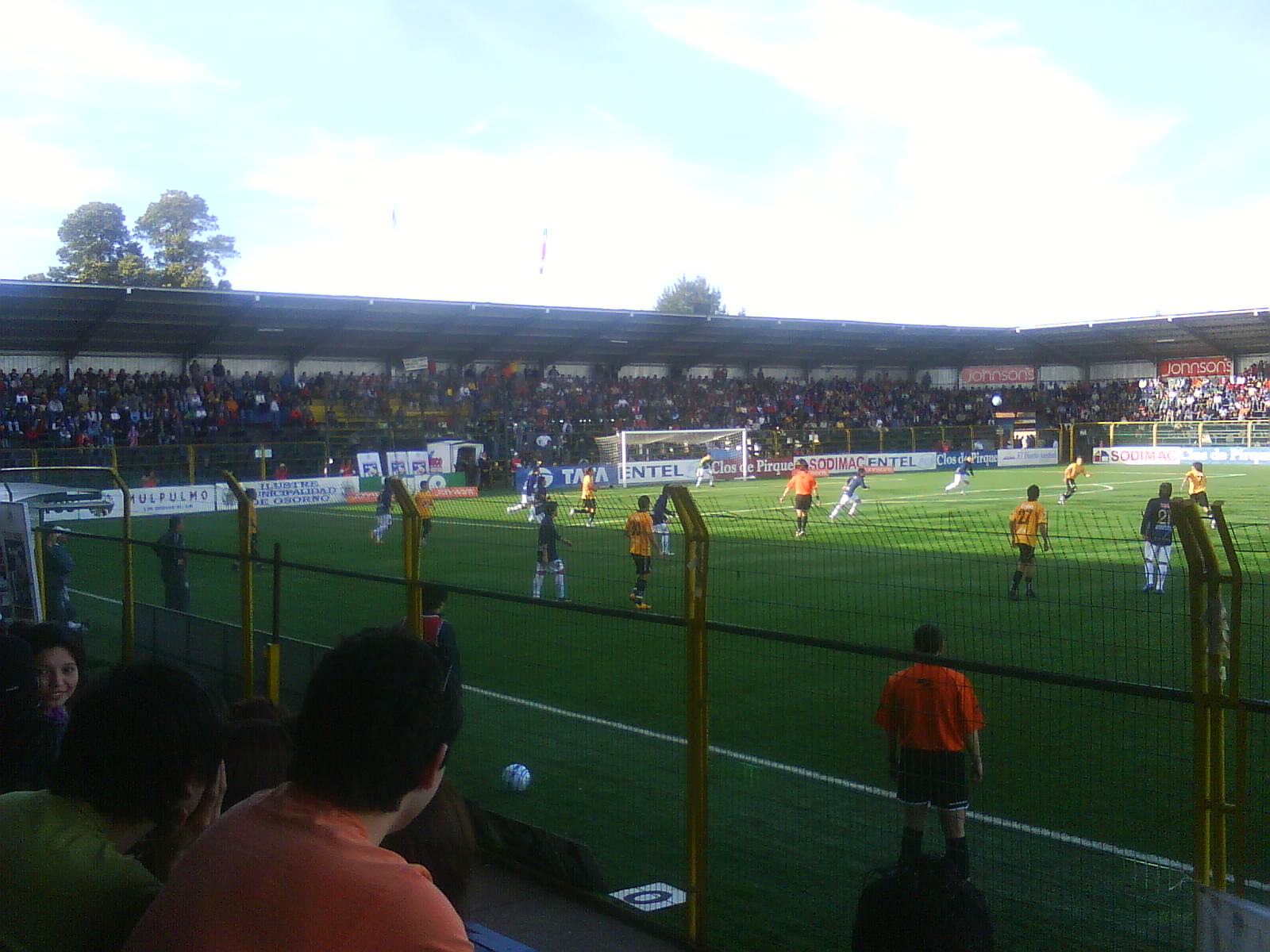 Vista interior del estadio Rubén Marcos Peralta, en Osorno, Chile.